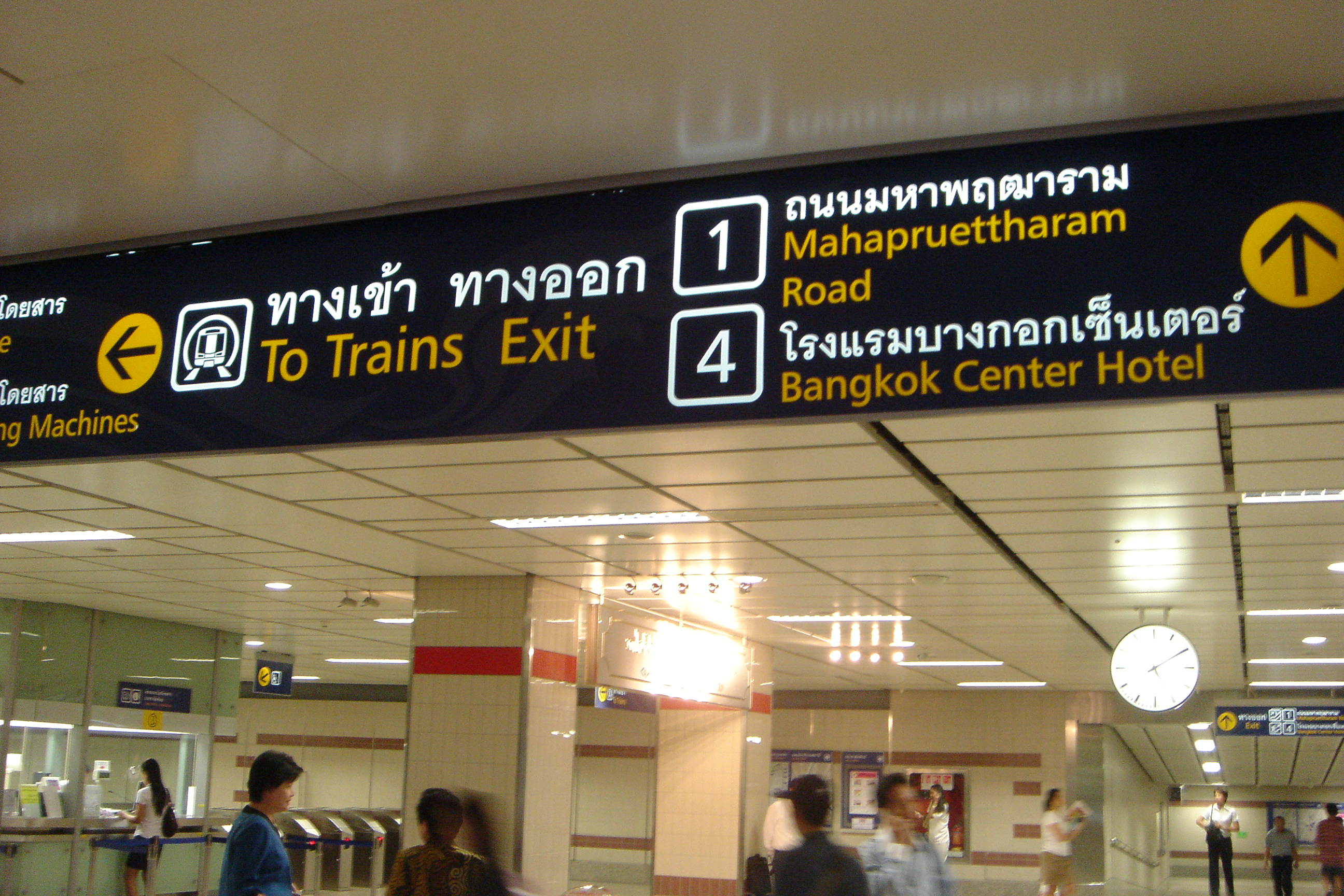 Señalización bilingüe en el Metro de Bangkok (Tailandia).